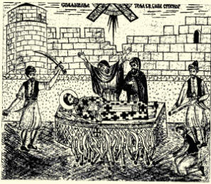 Спаљивање моштију светог Саве, првог архиепископа Српског